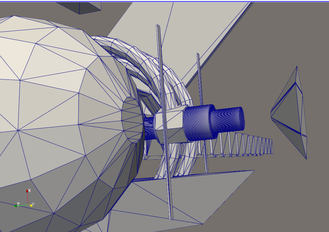 Simulation d'une station UrbanLoop